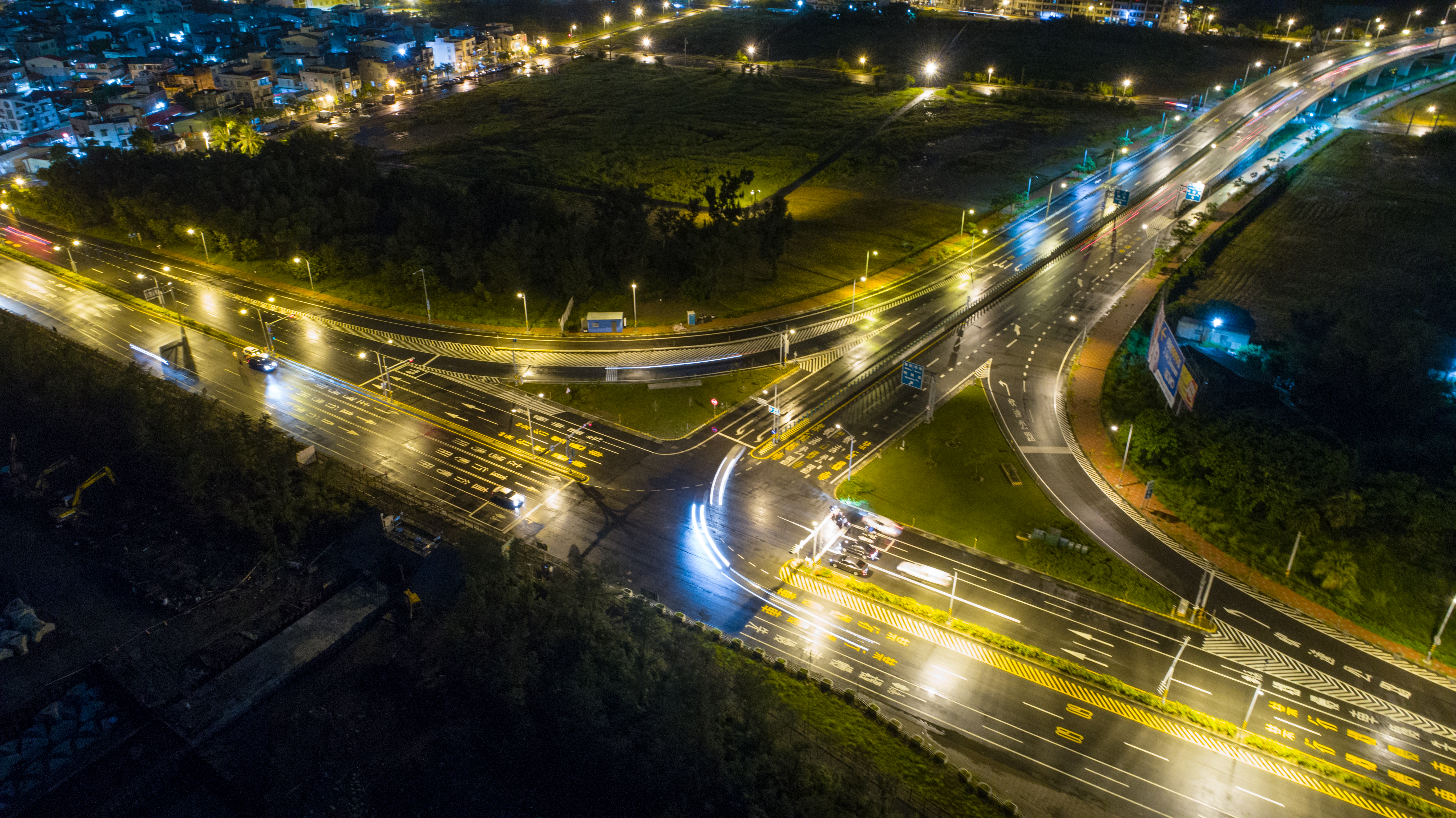 中文（台灣）: 夜間的臺86線與西部濱海公路2